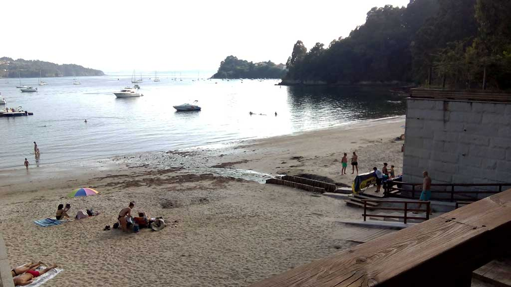 Praia do Río Sandeo, Fene.